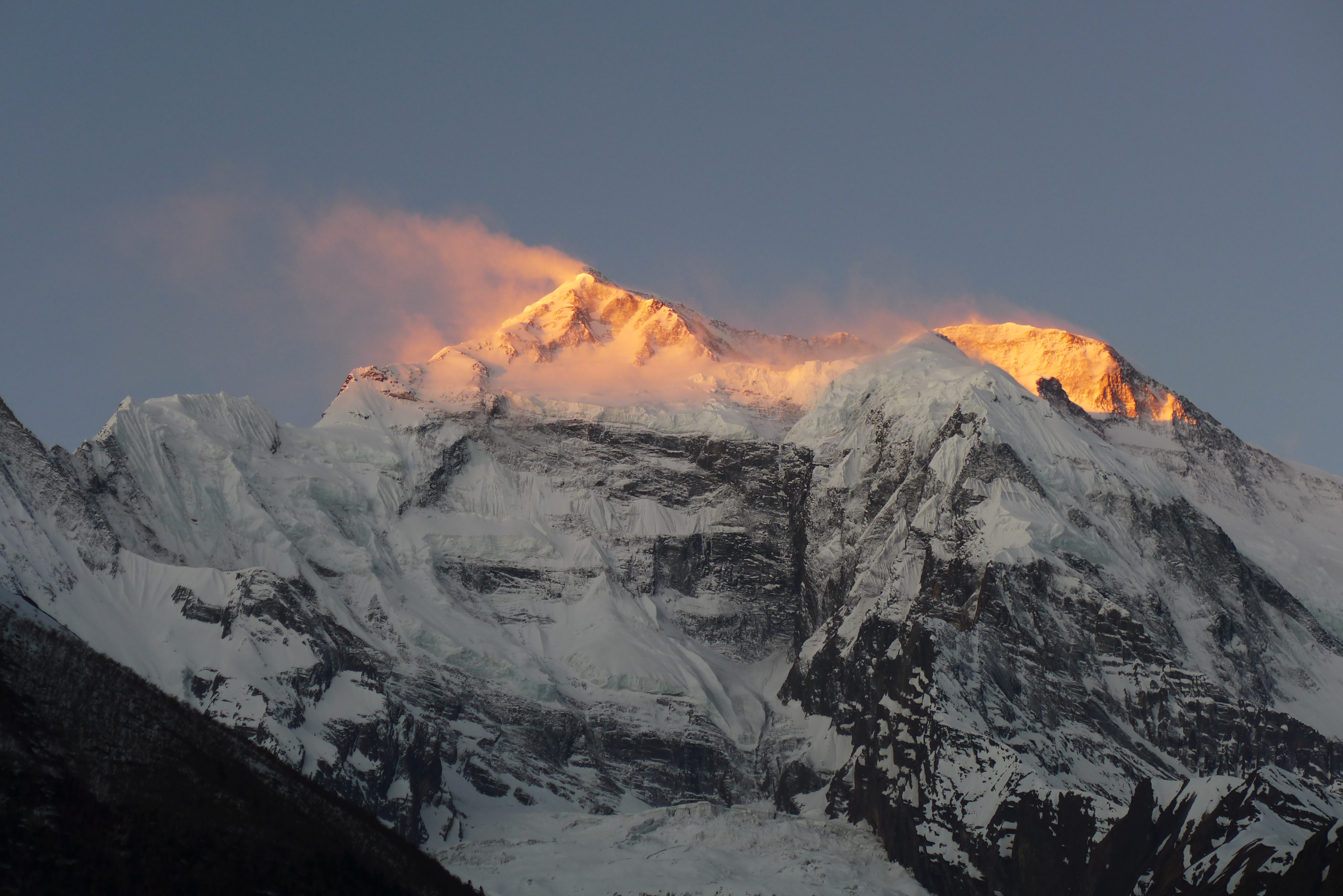 Аннапурна II (в центрі)